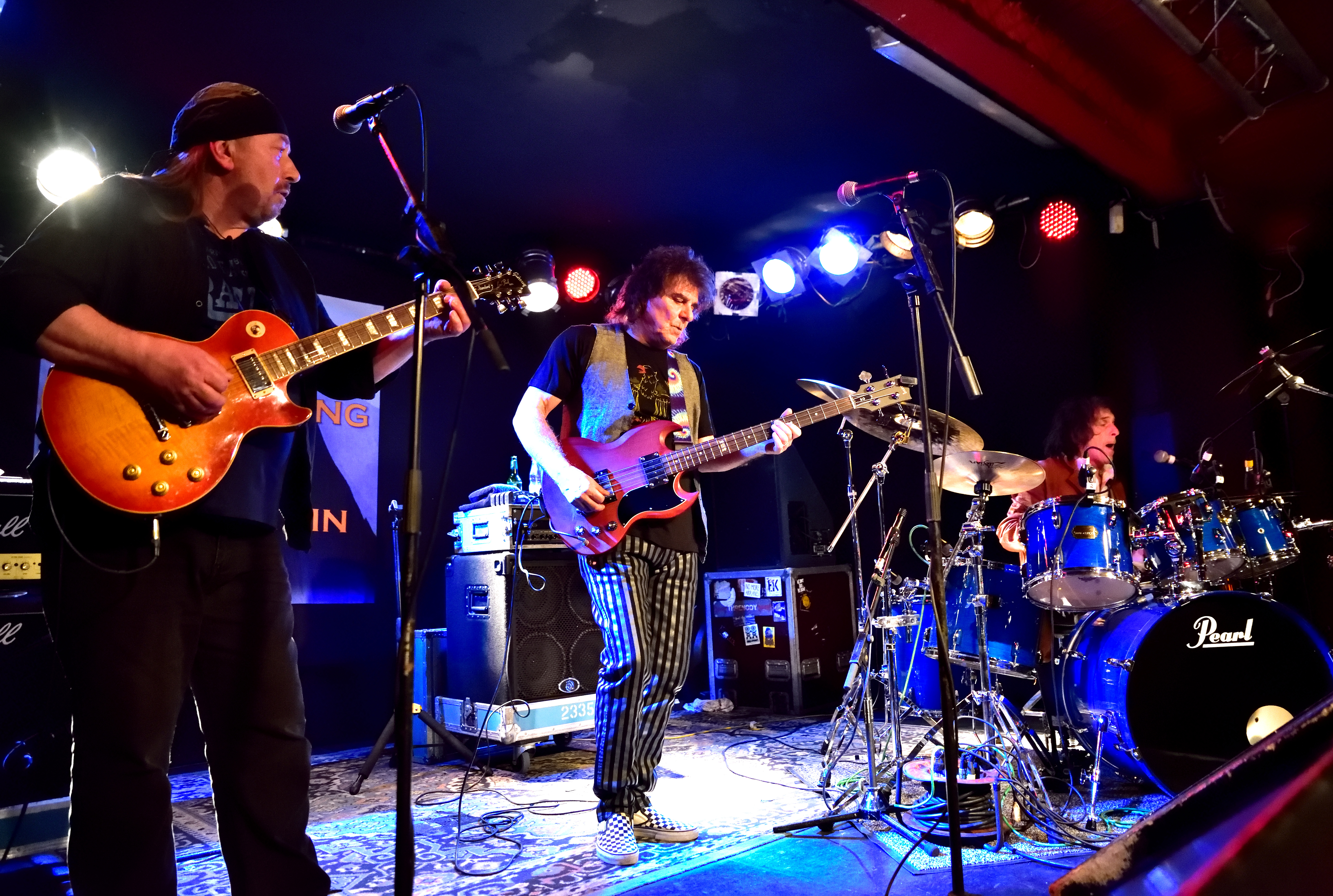 Corky Laing's Mountain bei The German Sleighrige Tour 2016 in der Markthalle Hamburg